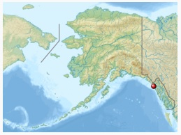 ekranbildo pri mapo en la koncerna paĝo en enwiki kiu baziĝas sur ĝenerala alaska mapo el Komunejo